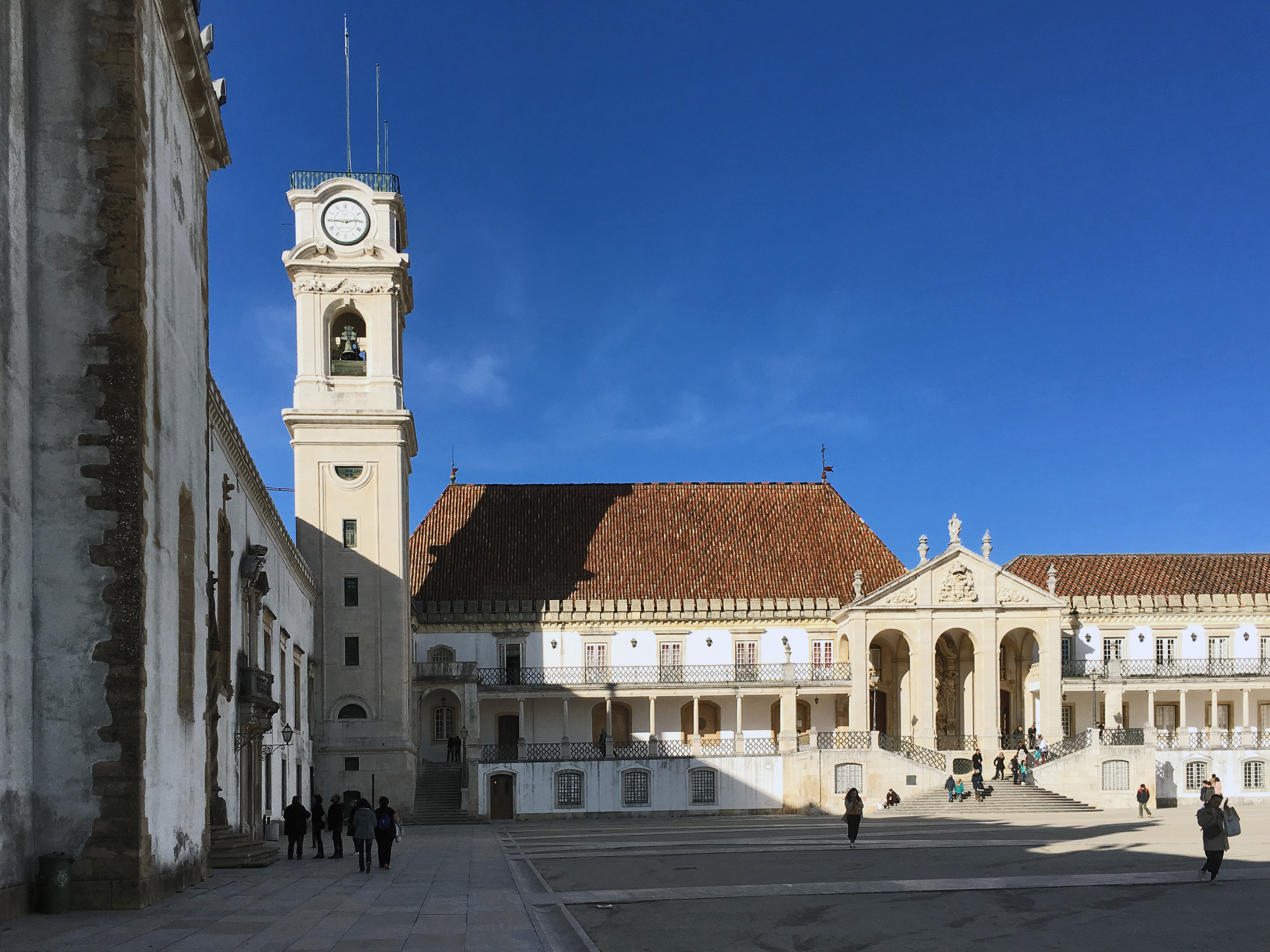 portugal janeiro de 2018